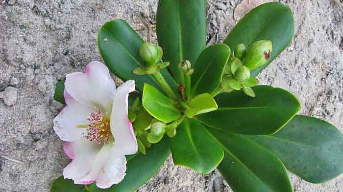 Bonnetia stricta (Nees) Nees & Mart.